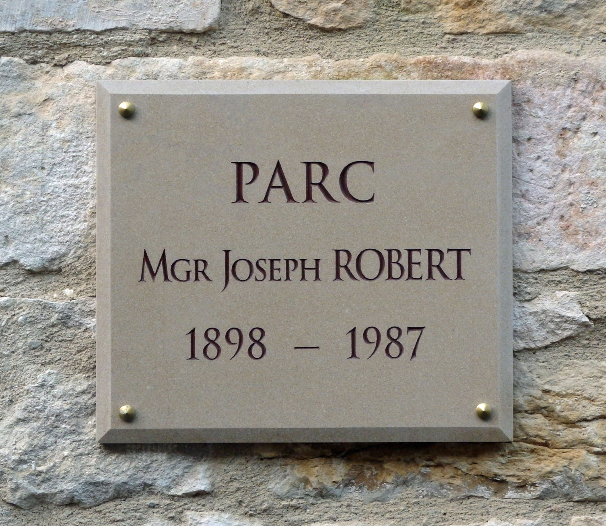 La plaque dévoilée le 2 juin 2018 à l'entrée du parc du château de Lugny à la mémoire de monseigneur Joseph Robert, ancien curé-archiprêtre de Lugny.